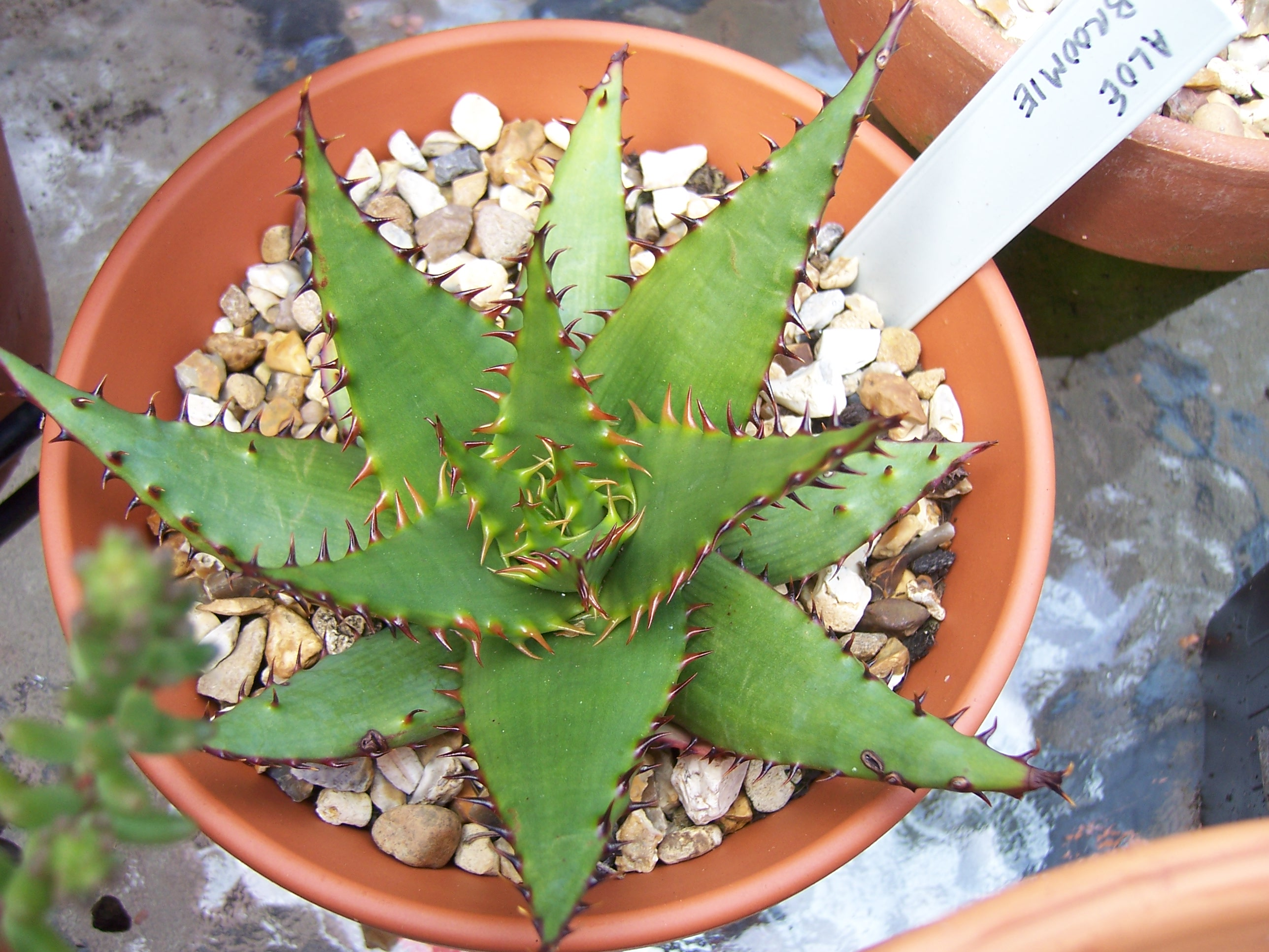 Aloe Broomie